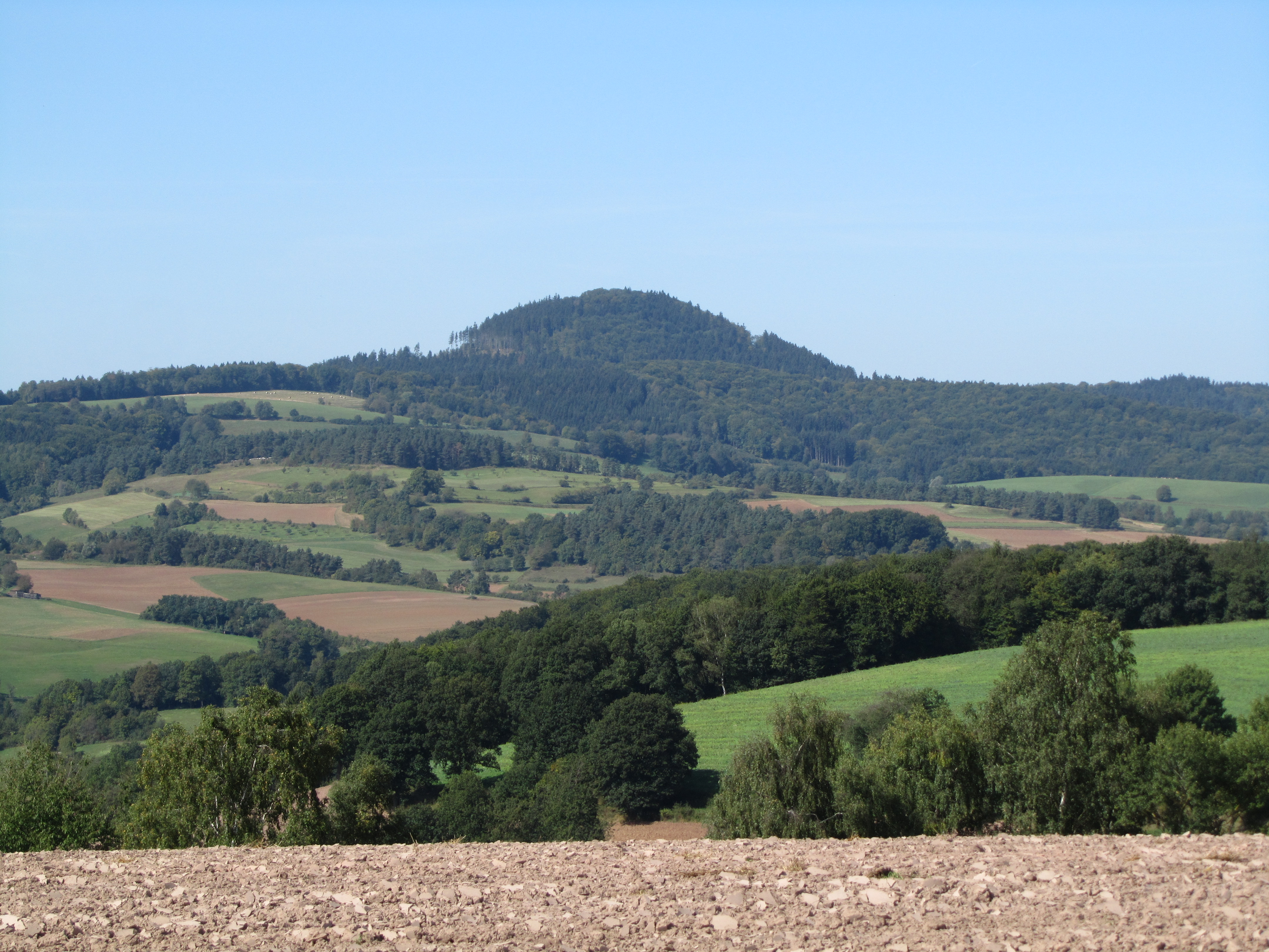 Der Alheimer (549 m) im Stölziger Gebirge von Südosten